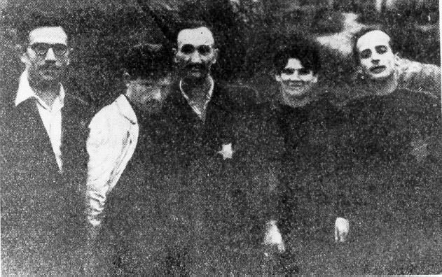 ועד "ארגון המאבק האנטיפשיסטי" בגטו קובנה (Kaunas; Kovno). זוהו: דימה גלפרין (Dima Galperin) - ראשון מימין לשמאל; מרים לאן (Miriam Lan) - שנייה מימין לשמאל; חיים ילין (Chaim Yelin) - שלישי מימין לשמאל; משה שרמן (Moshe Sherman) - שני משמאל לימין; פסח גורדון - שטיין (Pesach Gordon - Stein) - ראשון משמאל לימין. לשניים מהמצולמים - טלאי צהוב.